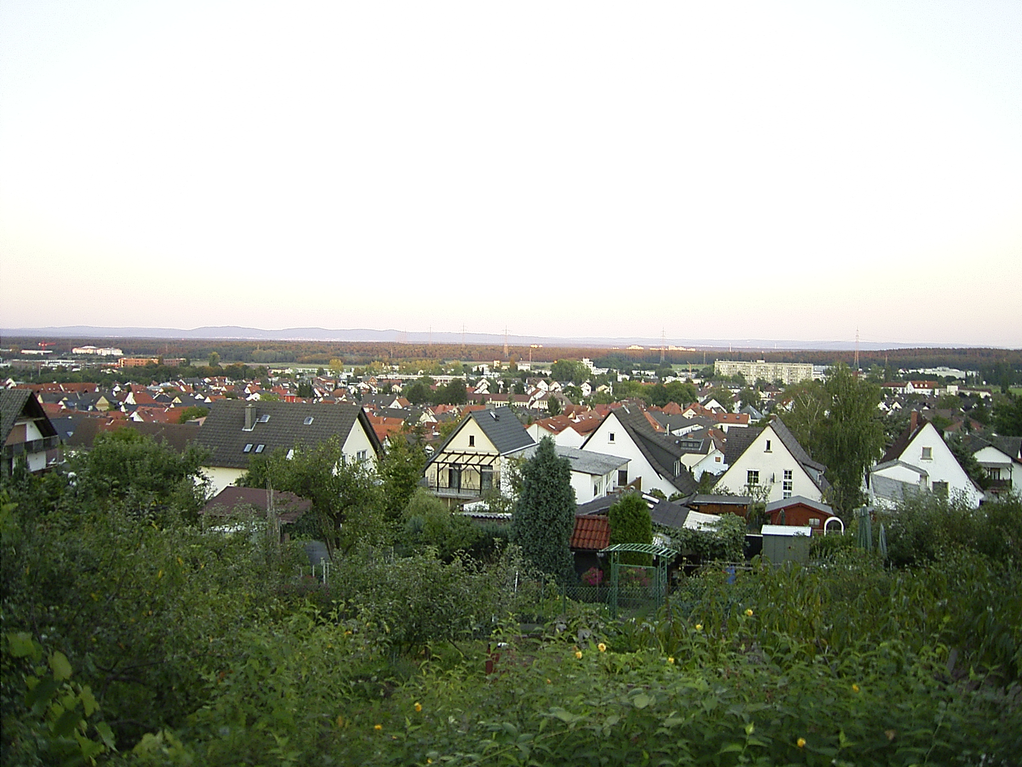 Dietzenbach Hessen Stadtansicht, vom Wingertsberg aus aufgenommen